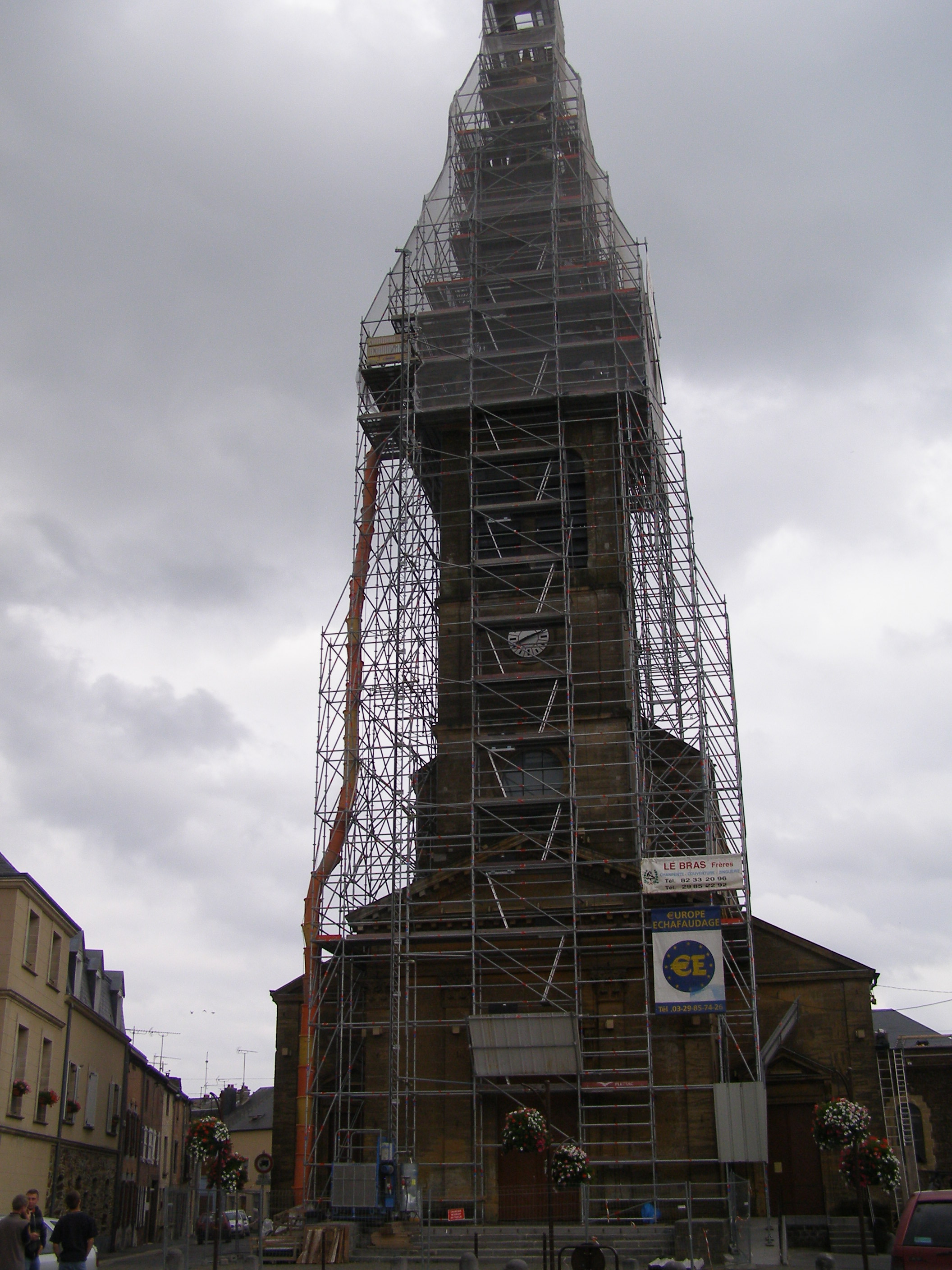 Échafaudage installé à l'église de Rocroi (Ardennes, France).